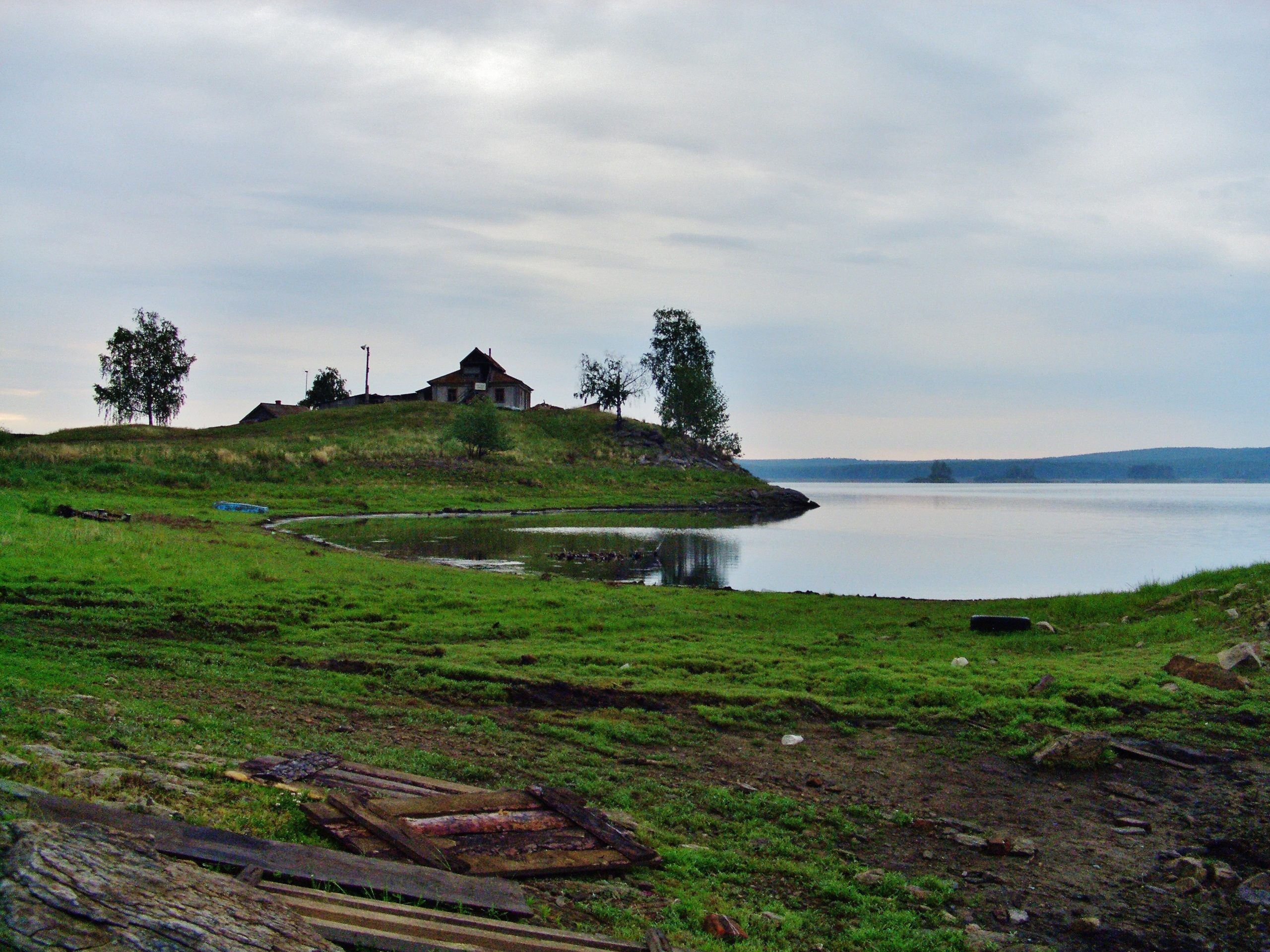 Аргазинское водохранилище.